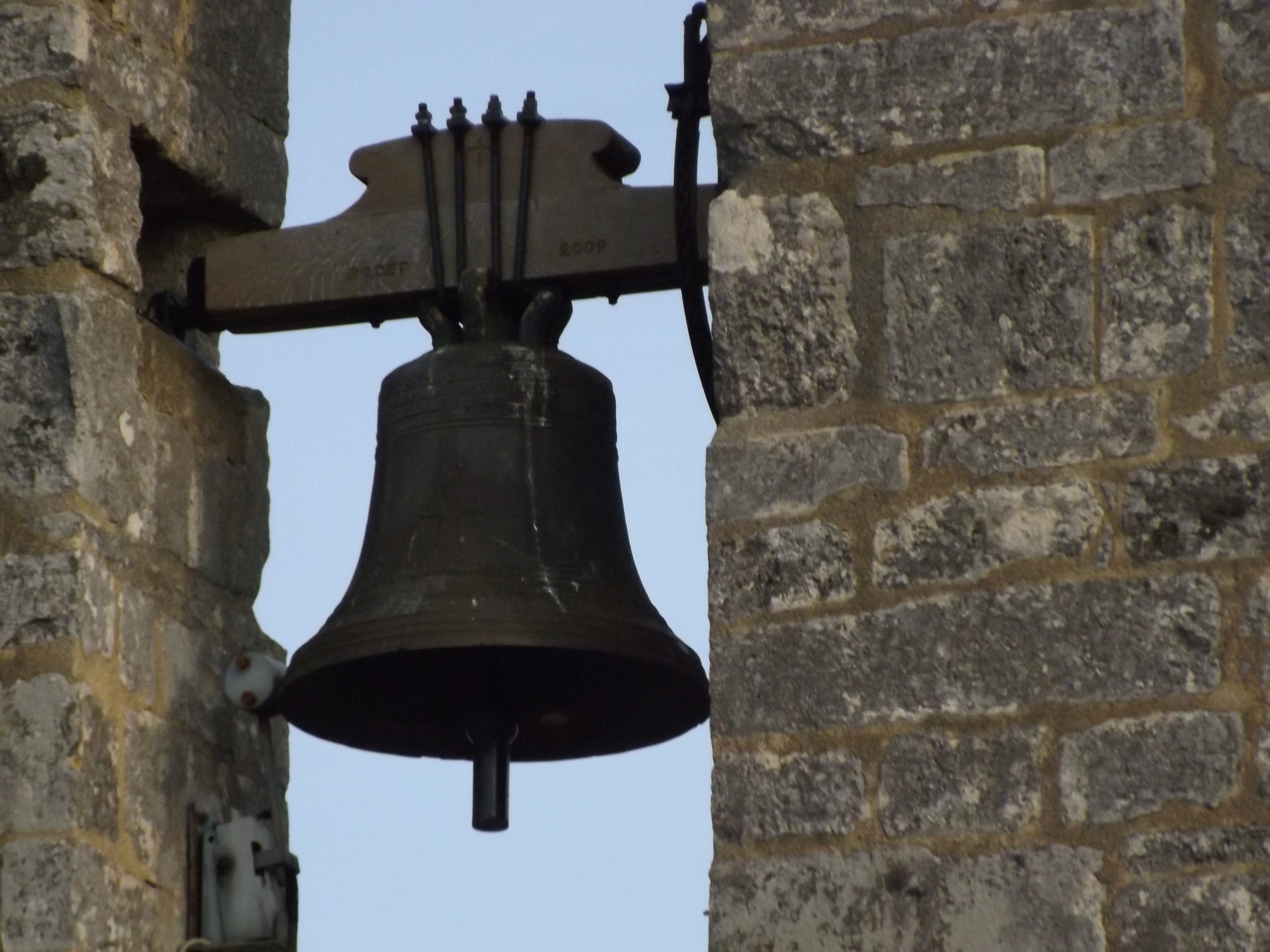 La cloche de l'église romane de Breuillet en Charente-Maritime